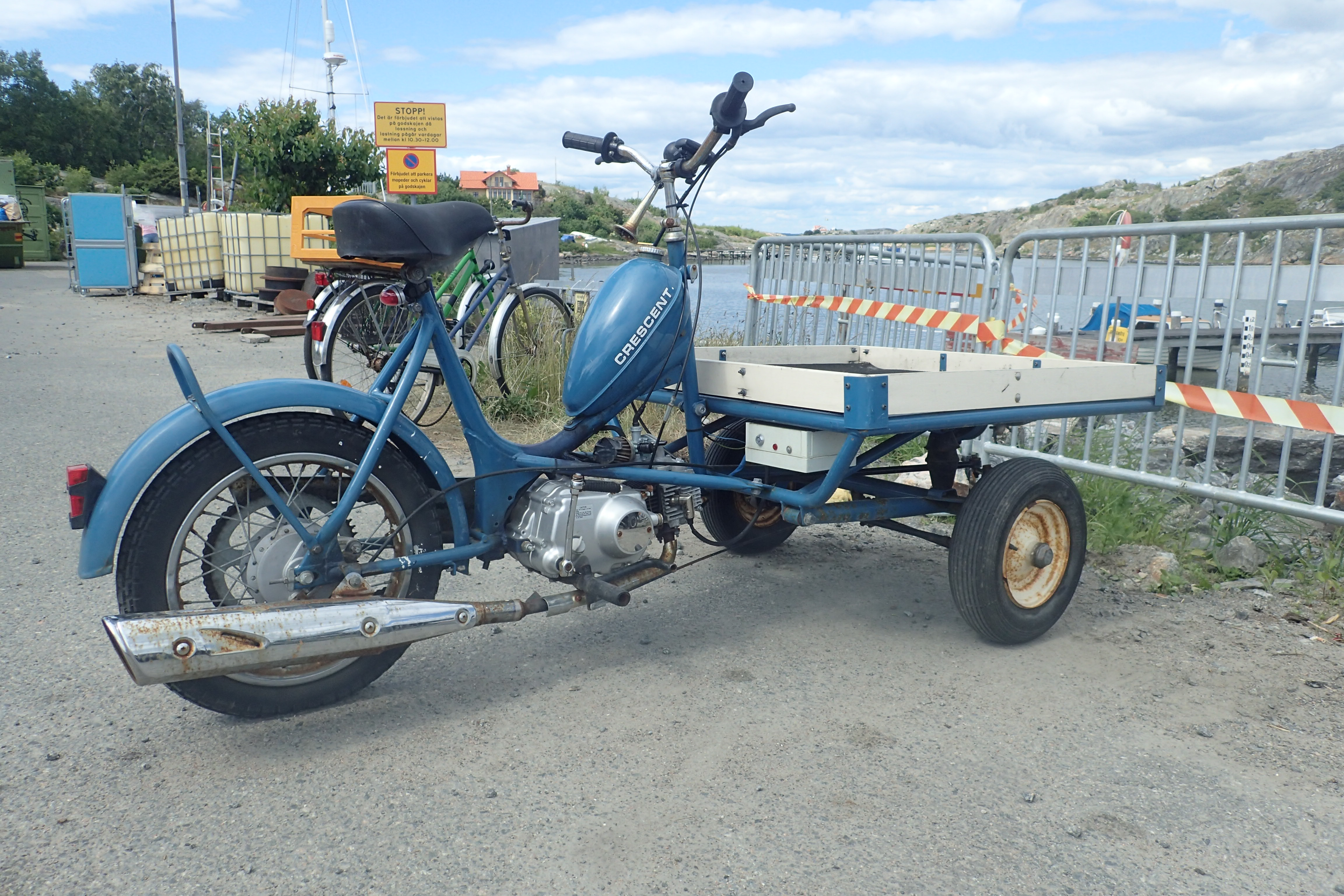 Crecent flakmoped parkerad på Brännö.